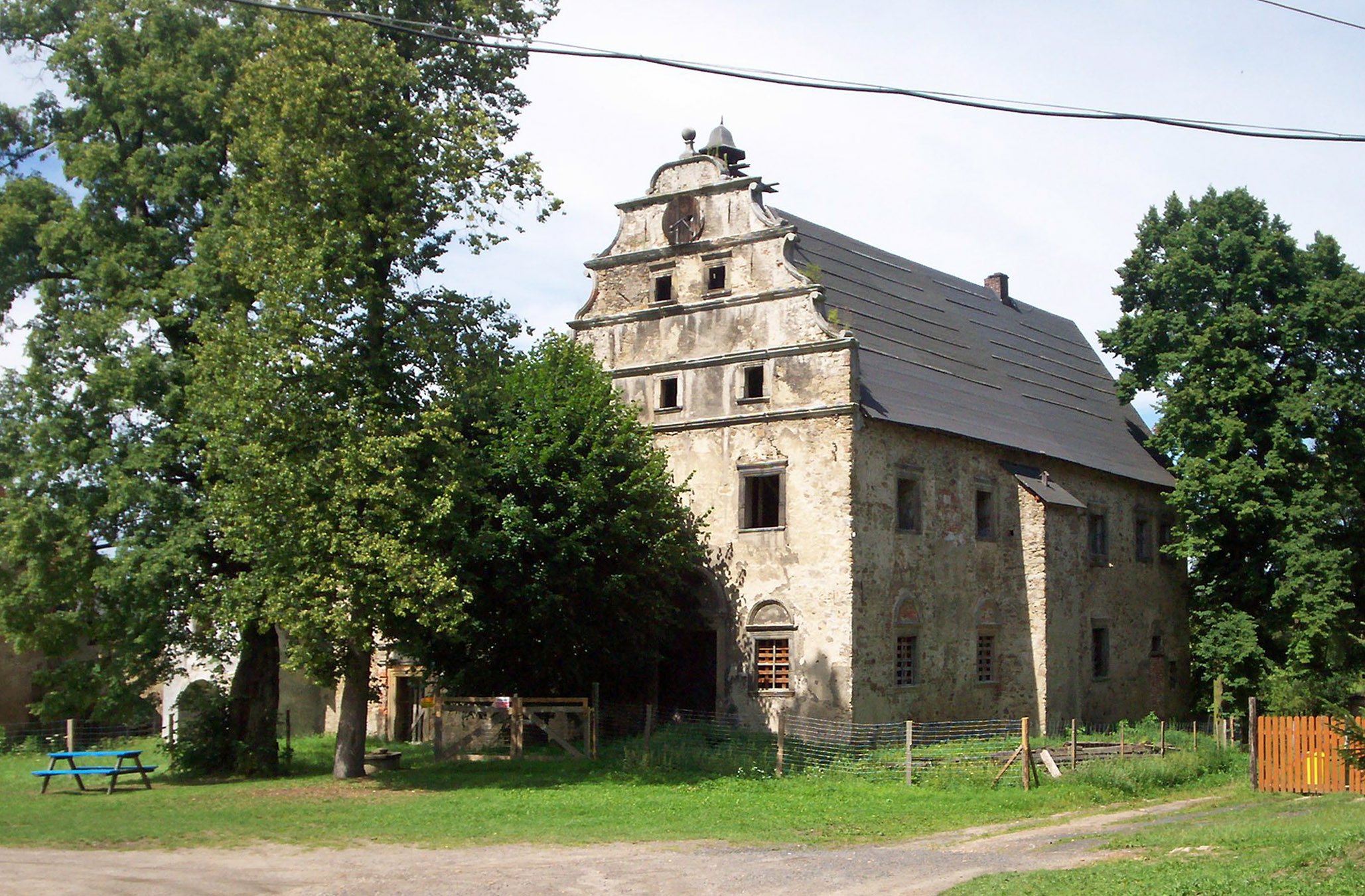 Dwór w Maciejowcu, w gminie Lubomierz.